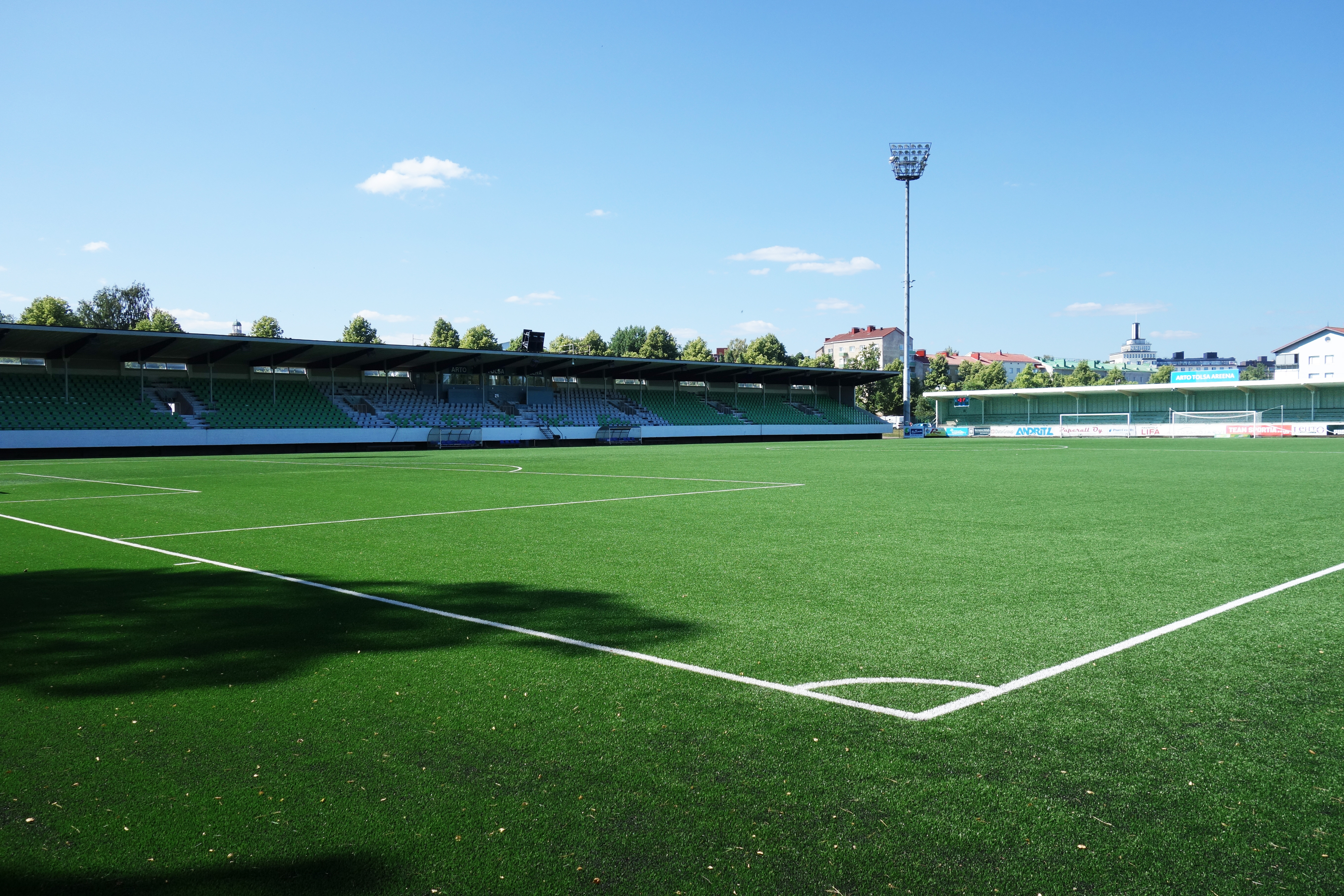 Arto Tolsa Areena, Kotka 18.7.2018